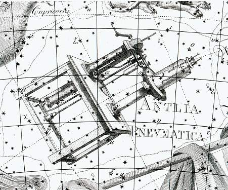 Antlia